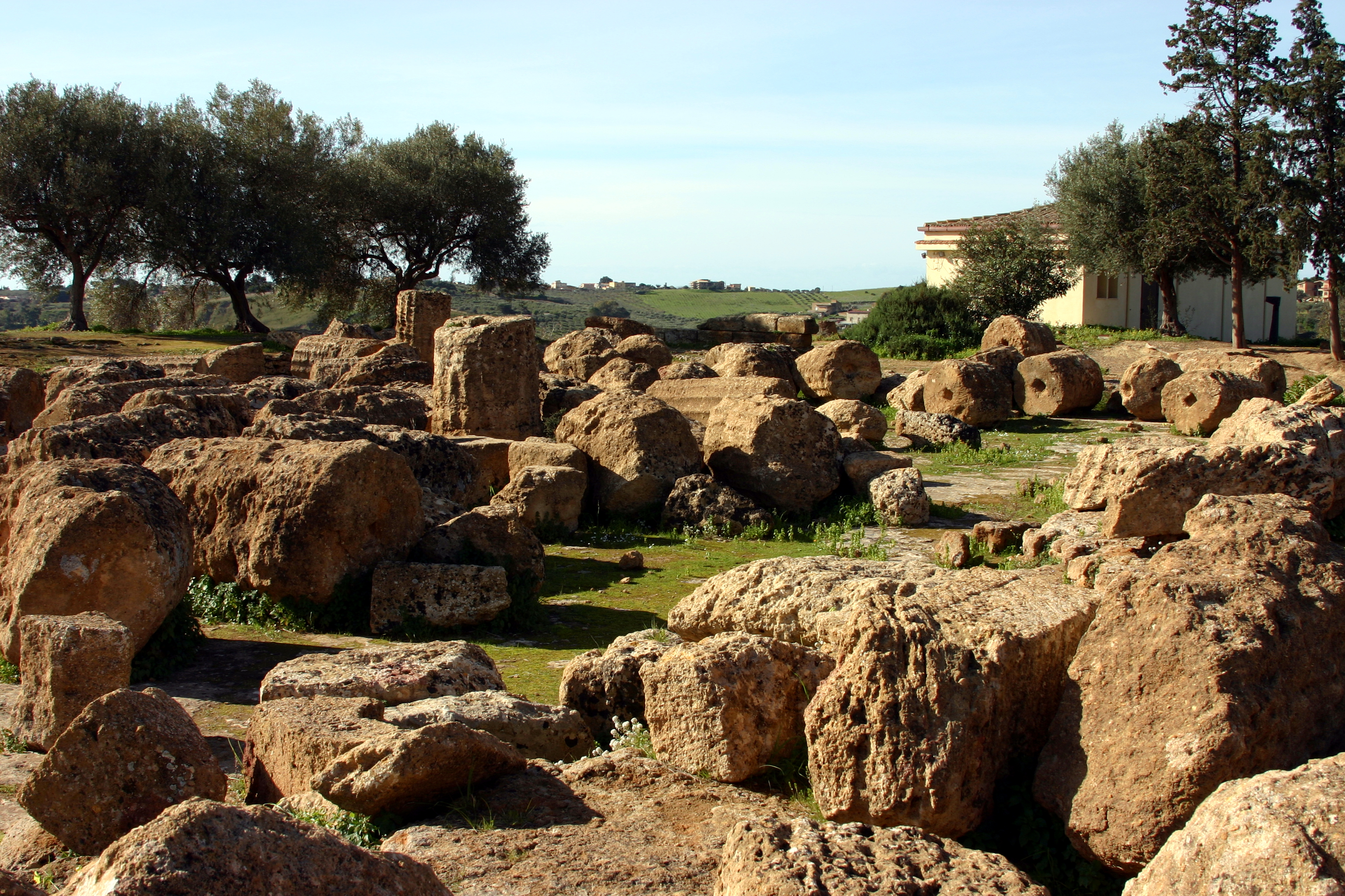 Temple of Zeus - Valle dei Templi